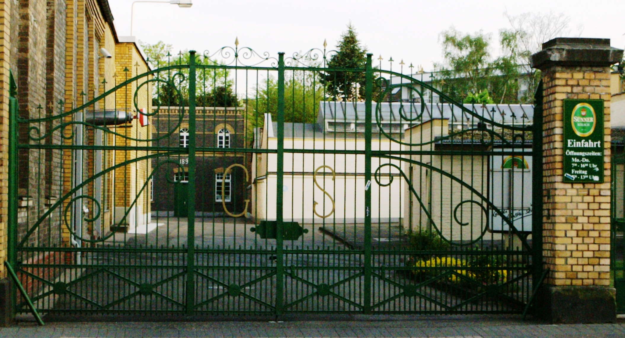 Eingangstor und im Hintergrund das 1898 gebaute zweigeschossige Kutschenhaus der Sünner-Brauerei in Köln-Kalk